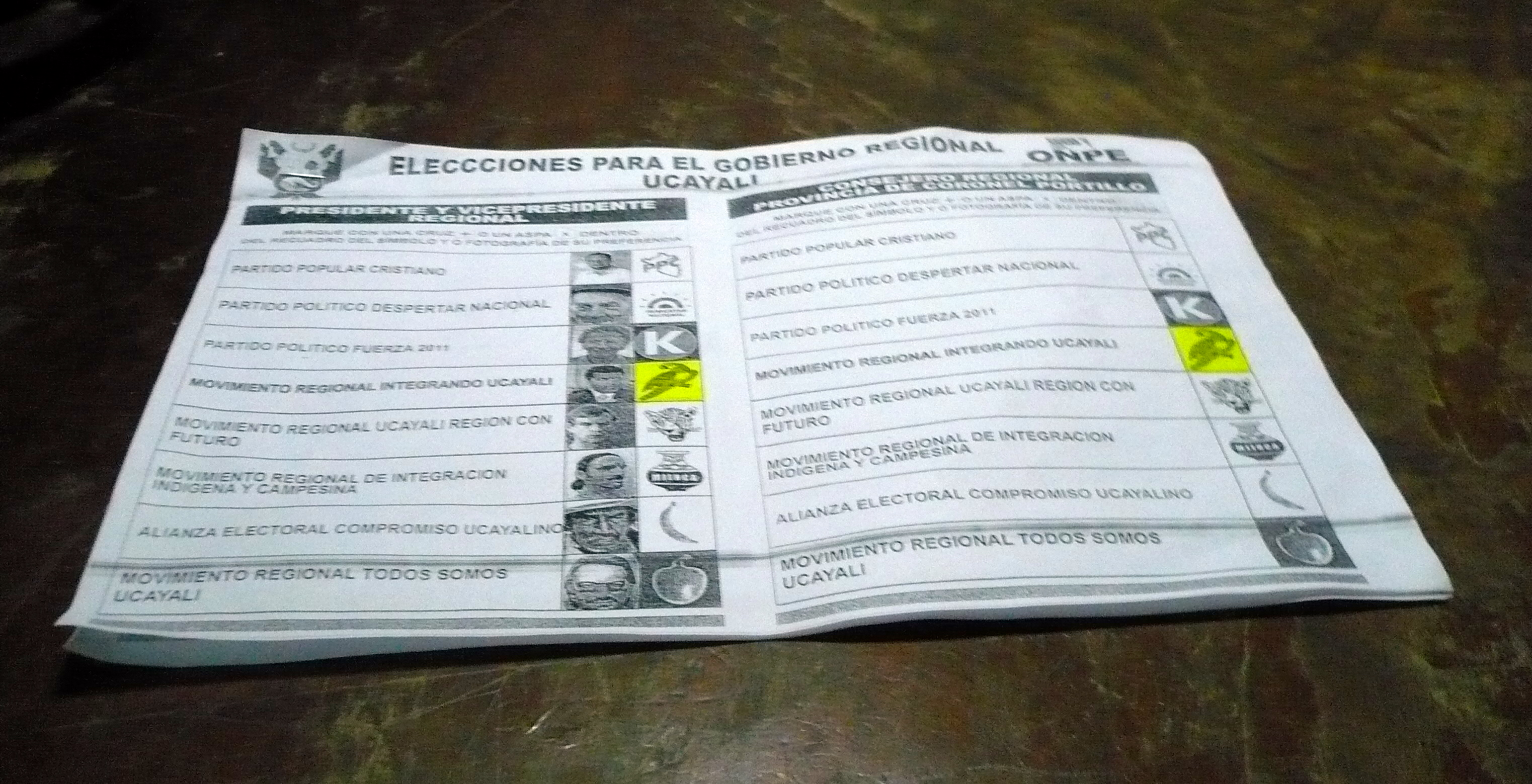 Célula de la agrupación política no oficial y publicado por una agrupación política en Pucallpa. Esta célula esta bajo autorización general al público por ONPE sin restricciones legales.